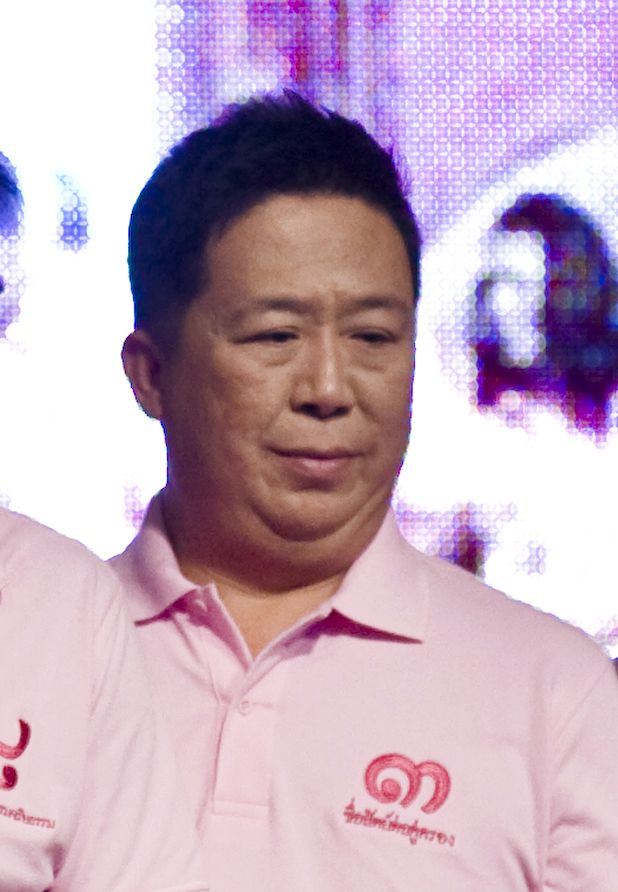 ตัน ภาสกรนที / นายกรัฐมนตรี เป็นประธานในงานเปิดโครงการคนไทยหัวใจภักดี ณ แฟชั่นฮอลล์ ชั้น 1 ศูนย์การค้าสยามพารากอน กรุงเทพฯ 30ตุลาคม2552 (The Official Site of The Prime Minister of Thailand Photo by พีรพัฒน์ วิมลรังครัตน์)